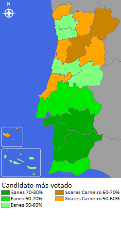 Resultados das eleições presidenciais portuguesas de 1980